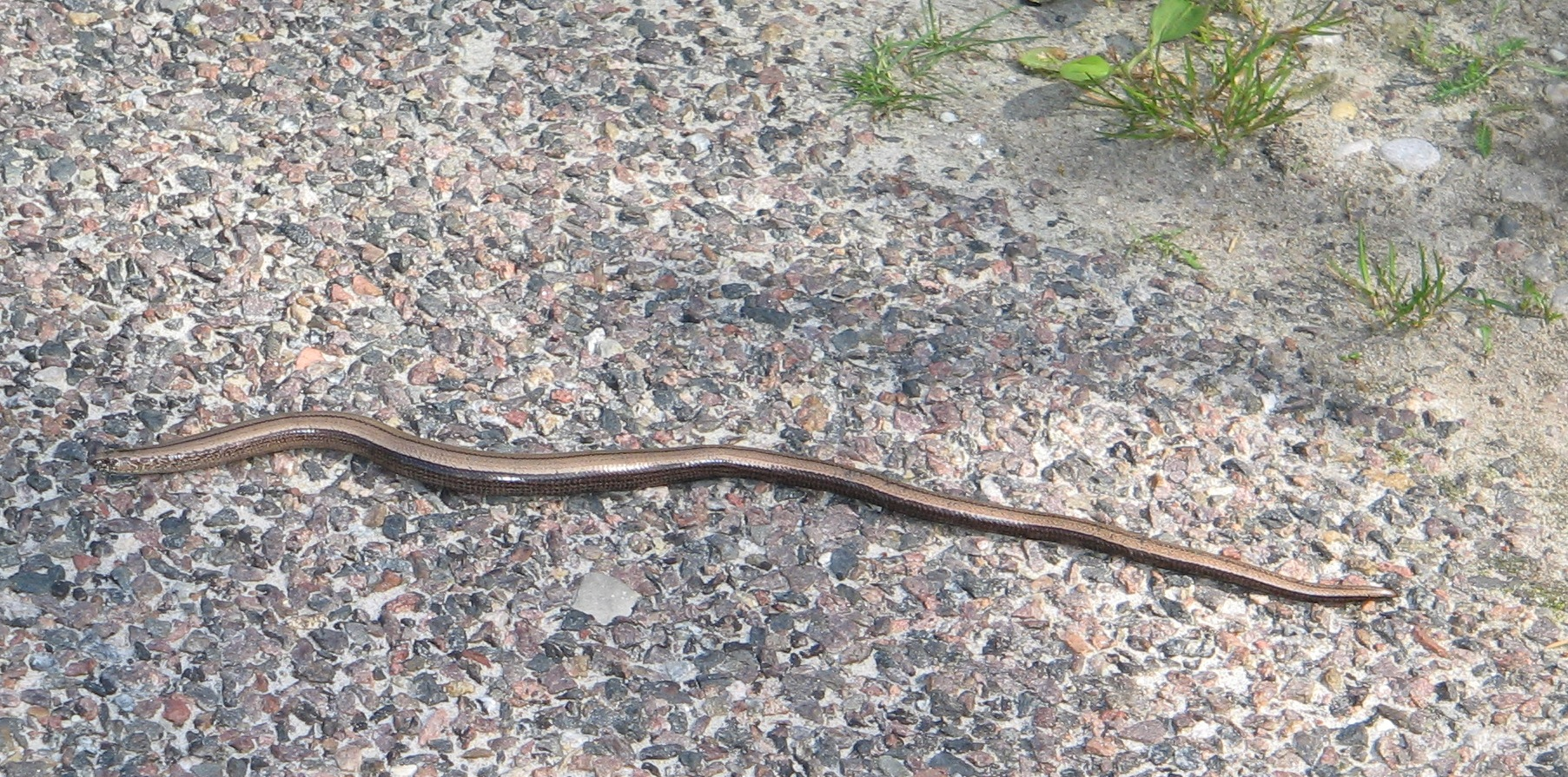 Anguis_fragilis =Веретеница Ломкая